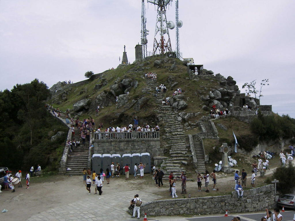 Cumio de Santa Tegra, concello da Guarda, Pontevedra, Galicia